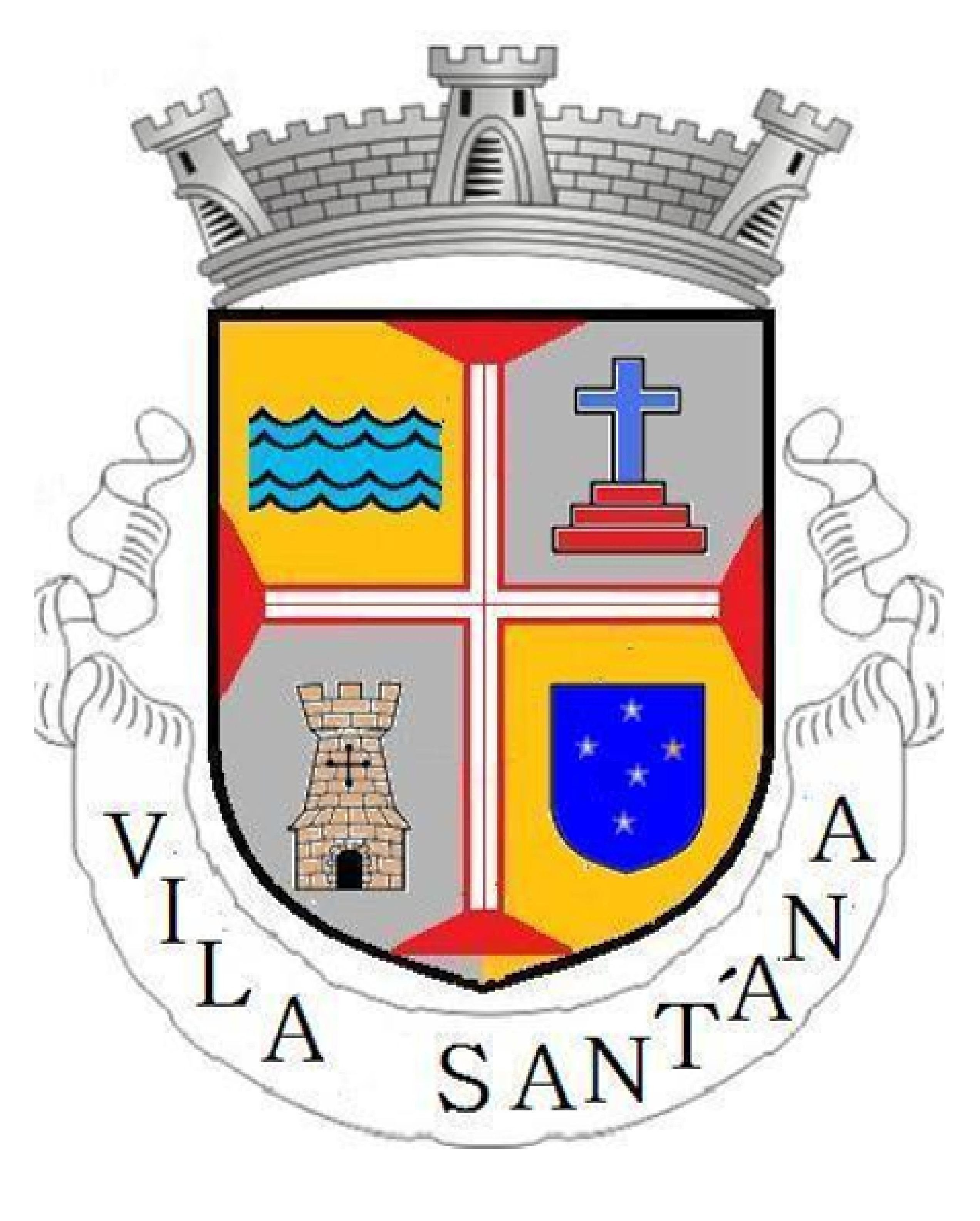 Escudo de Armas da Vila Santana, em Itaquera, São Paulo, Brasil